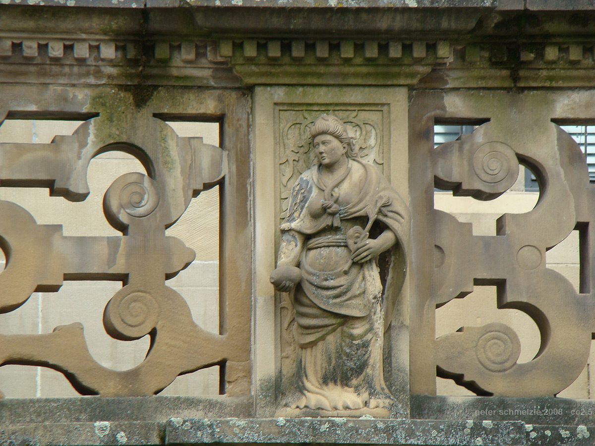 Geländerdetail der Freitreppe am Rathaus in Heilbronn